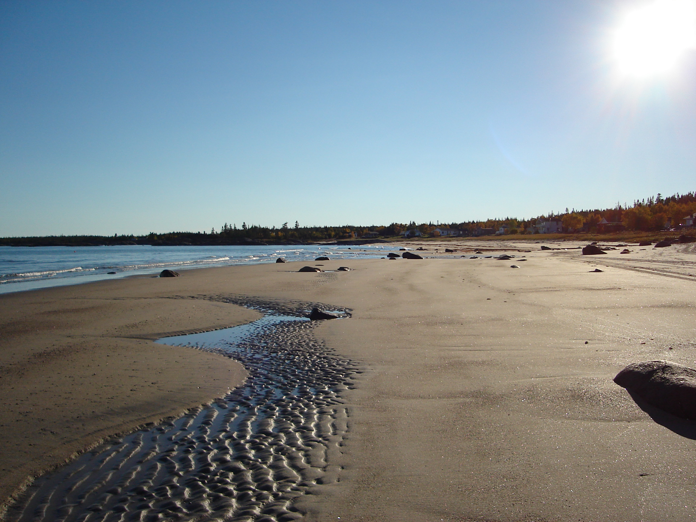 Plage de la baie des îles de mai. coté de la baie des sable.